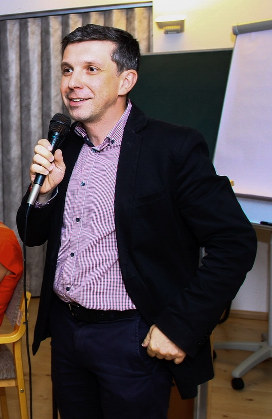 Jan Heinzl